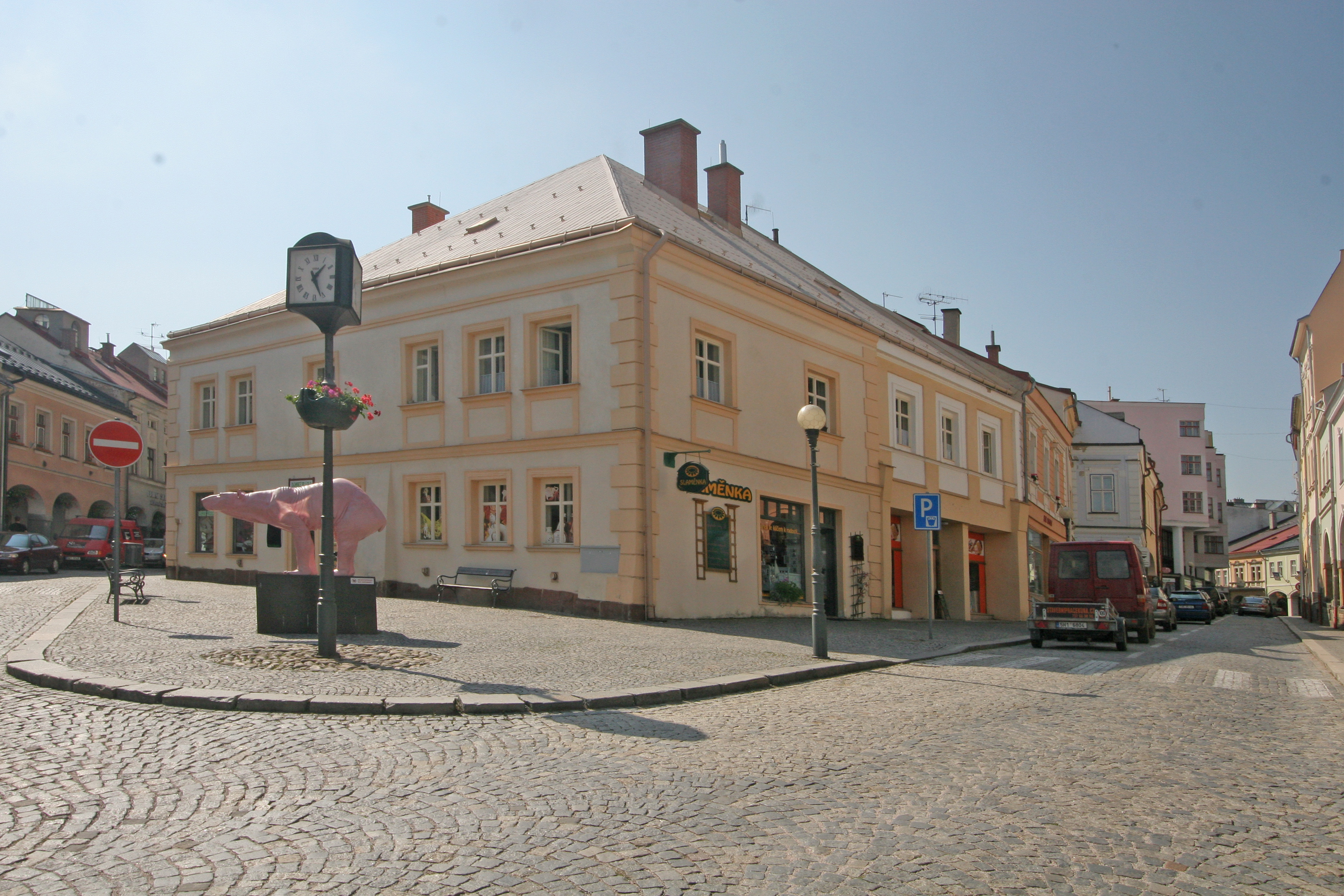 Dům čp. 143, Bulharská 143, Vnitřní Město, Trutnov.